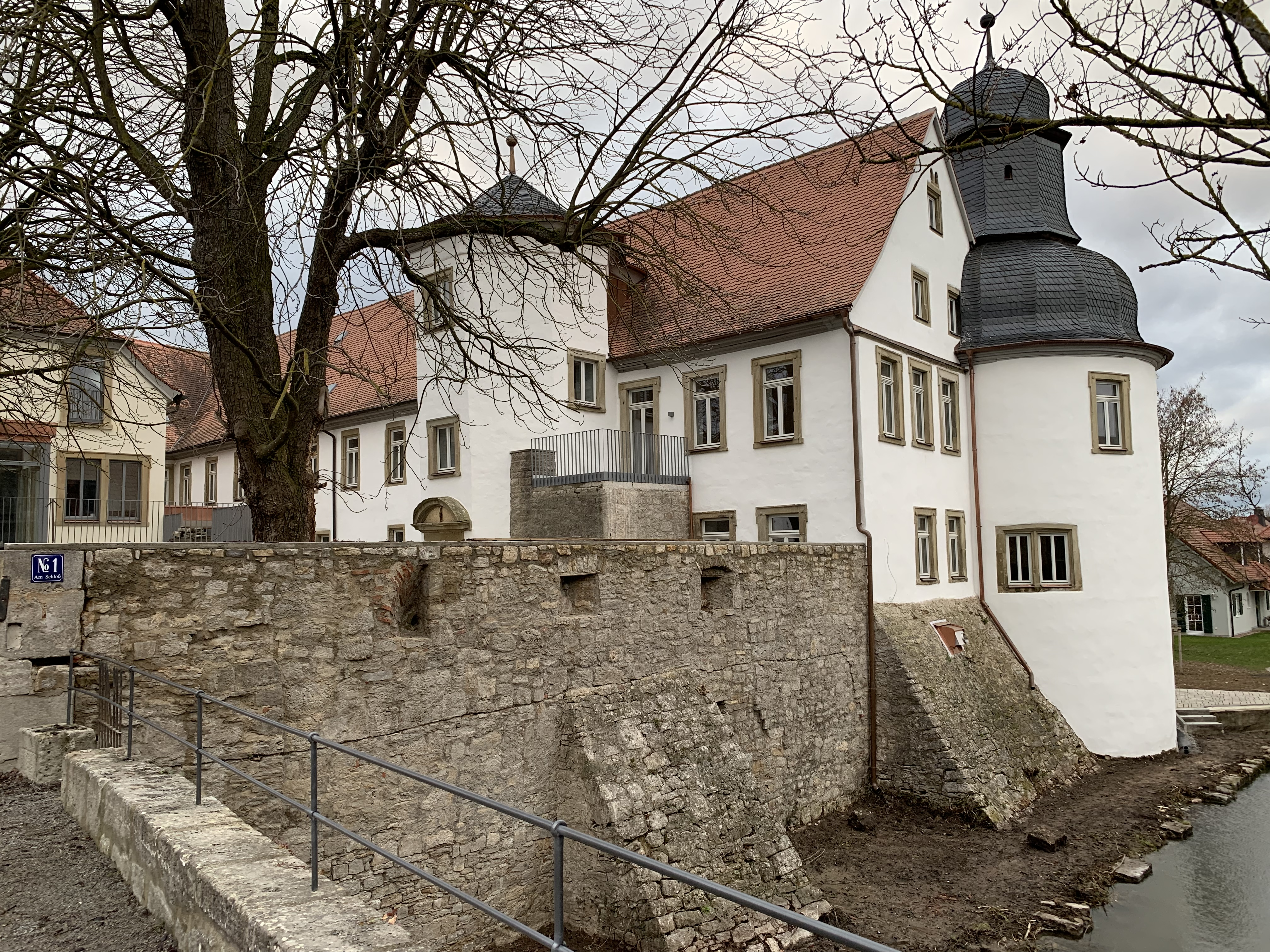 Wolfskeelsche Schloss in Rottenbauer